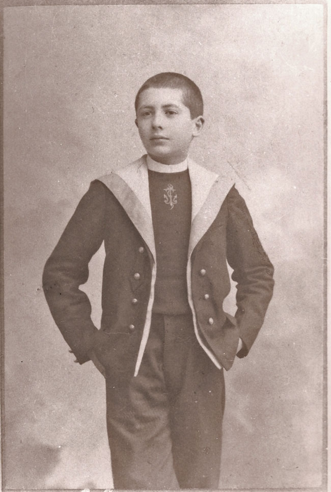 Alain Fournier au Lycée Voltaire(Paris)